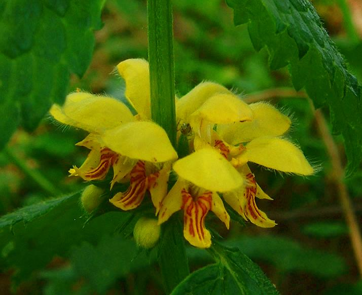 Lamier jaune (détail fleur), Gy